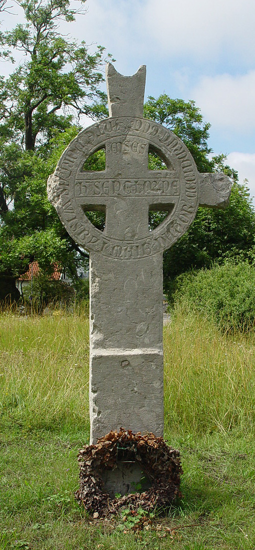 Visby: Waldemarkreuz (Waldemar IV Atterdag) aus dem 14.Jh. Lateinische Inschrift erinnert an die Schlacht vom 27.07.1361